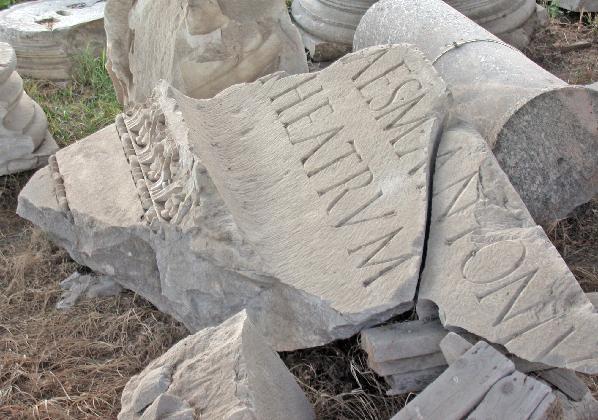 Italia, regione Campania, provincia di Caserta, Teano, teatro romano, frammenti dell'iscrizione di dedica.